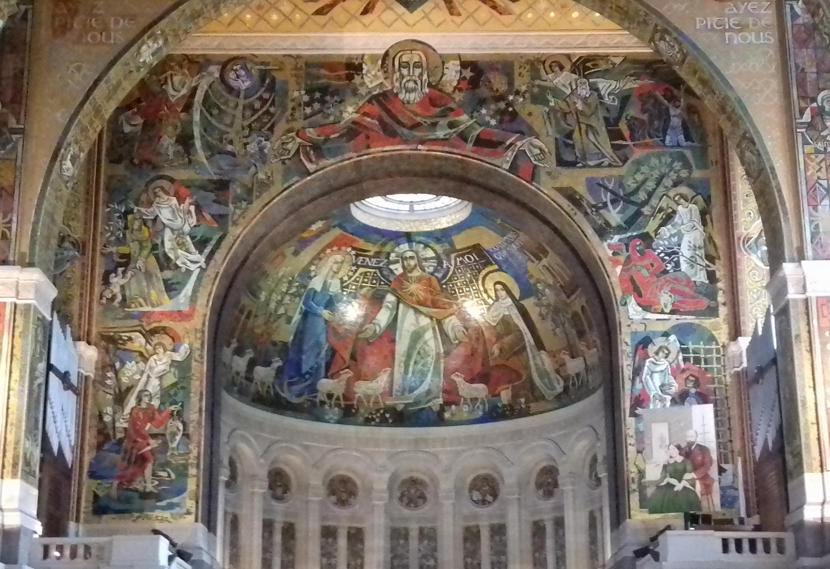 Choeur de la basilique avec les mosaïques